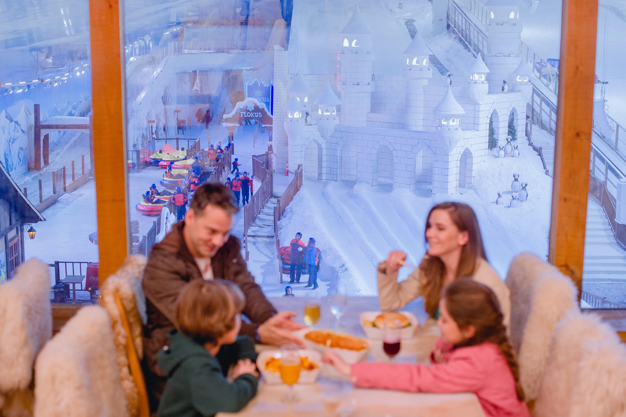 Viva a Neve!